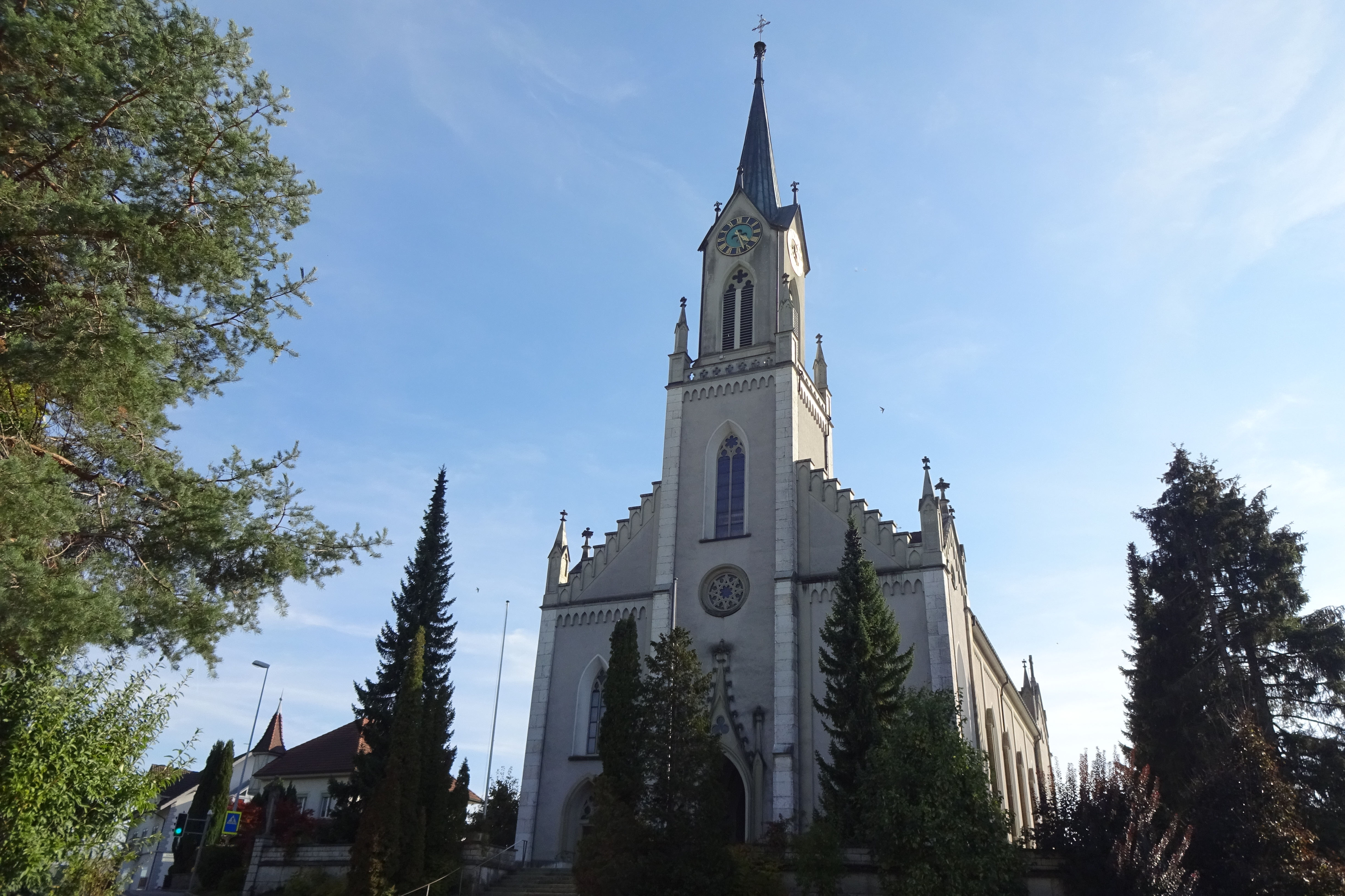 Grosswangen – Katholische Kirche St.Konrad (KGS-Nr 3678): Haupt- & Westfassade von Nordwesten